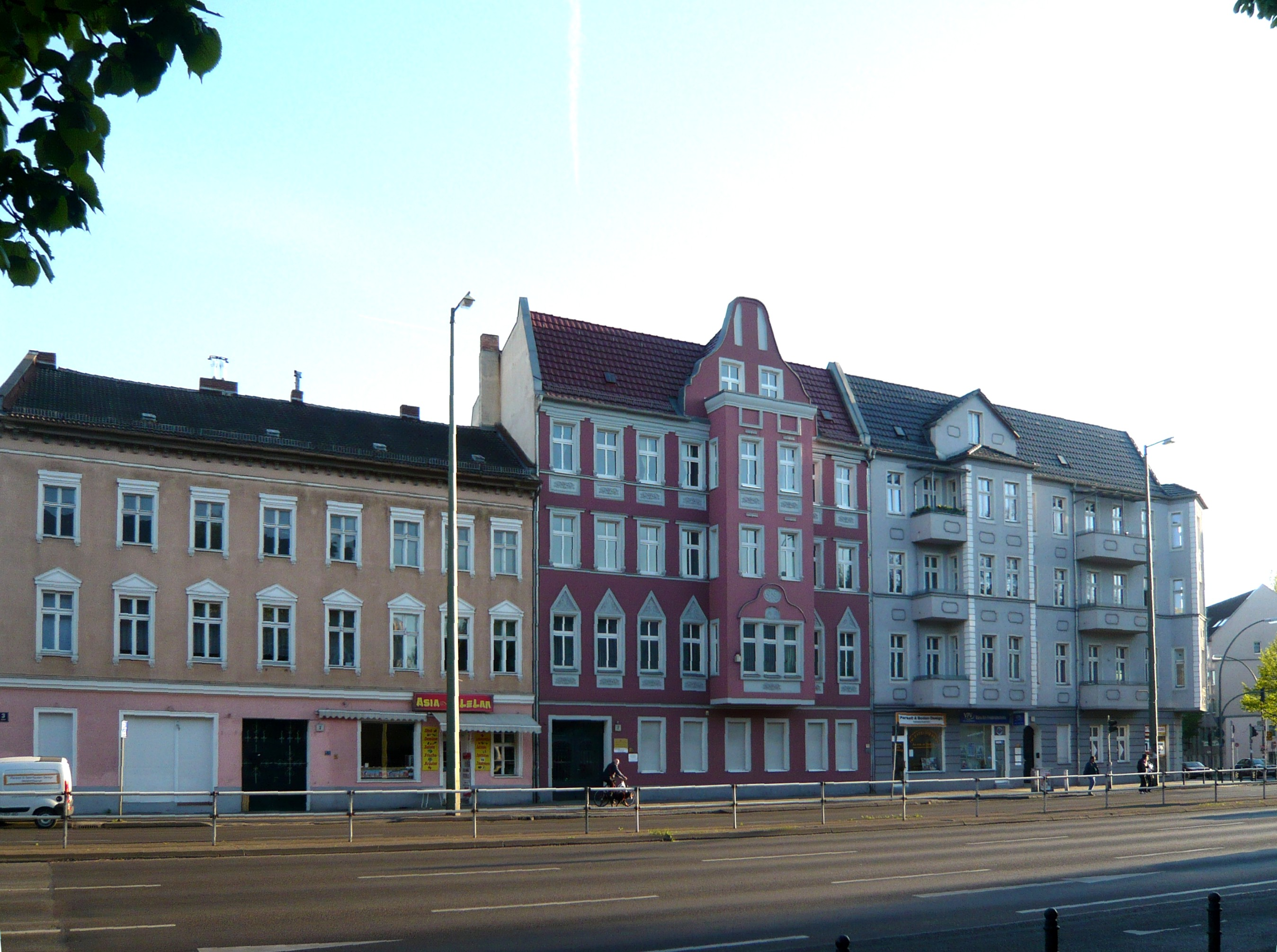 Ortsteil Friedrichsfelde: Alt-Friedrichsfelde; gerade gerückt